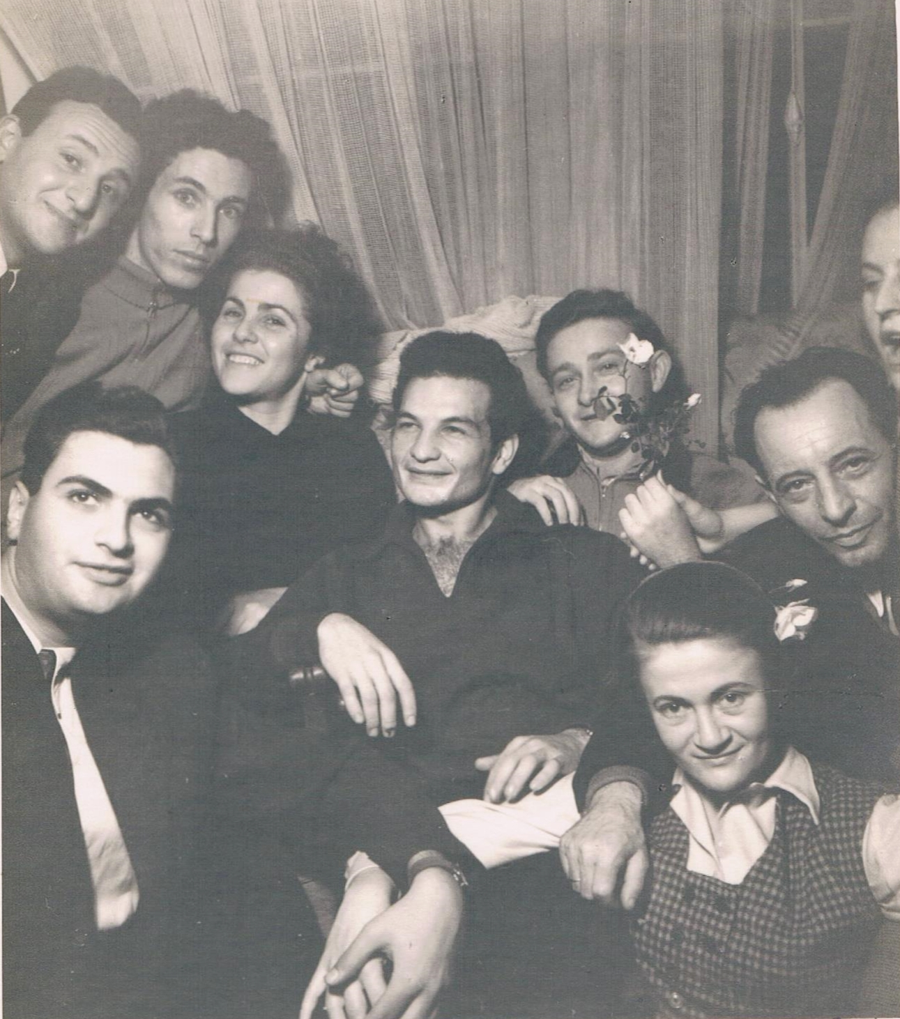 חברי הלהקה הצבאית הארצית